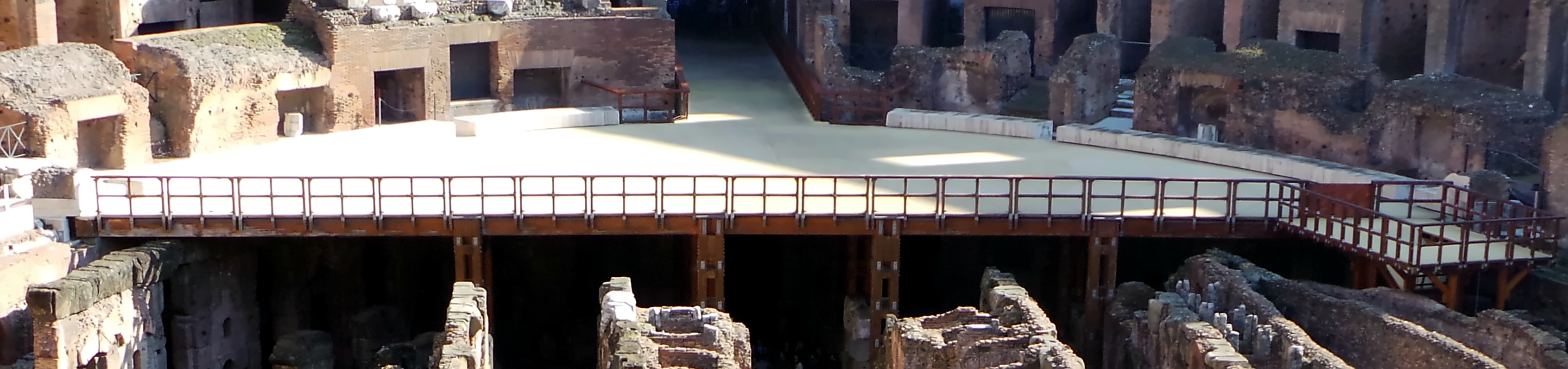 Moderner Nachbau des Arenabodens. Rechtsseitig ist die nachträglich hinzugefügte Rekonstruktion einer Hebebühne mit geöffneter Falltür erkennbar.